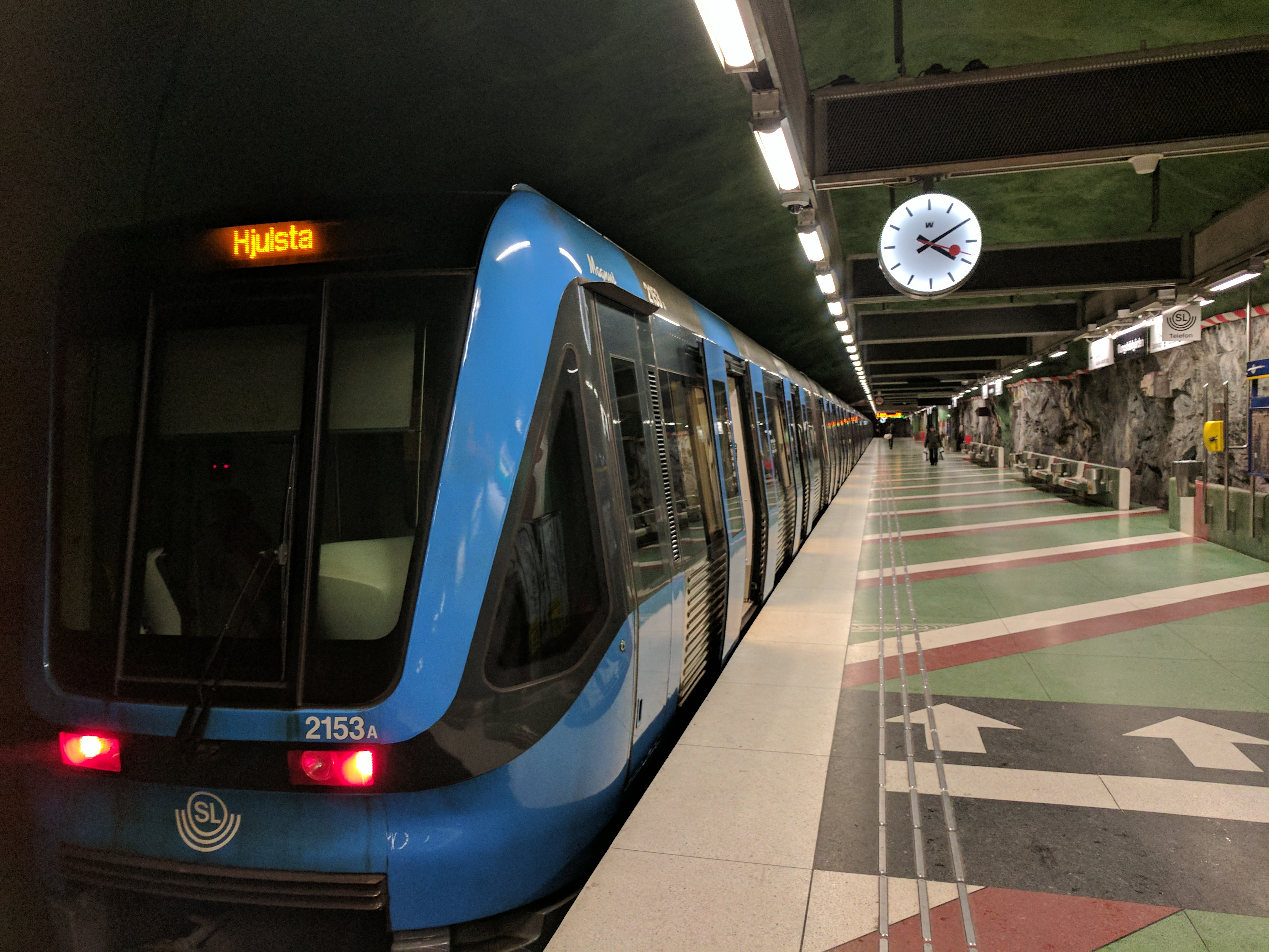 C20 på Kungsträdgården januari 2017